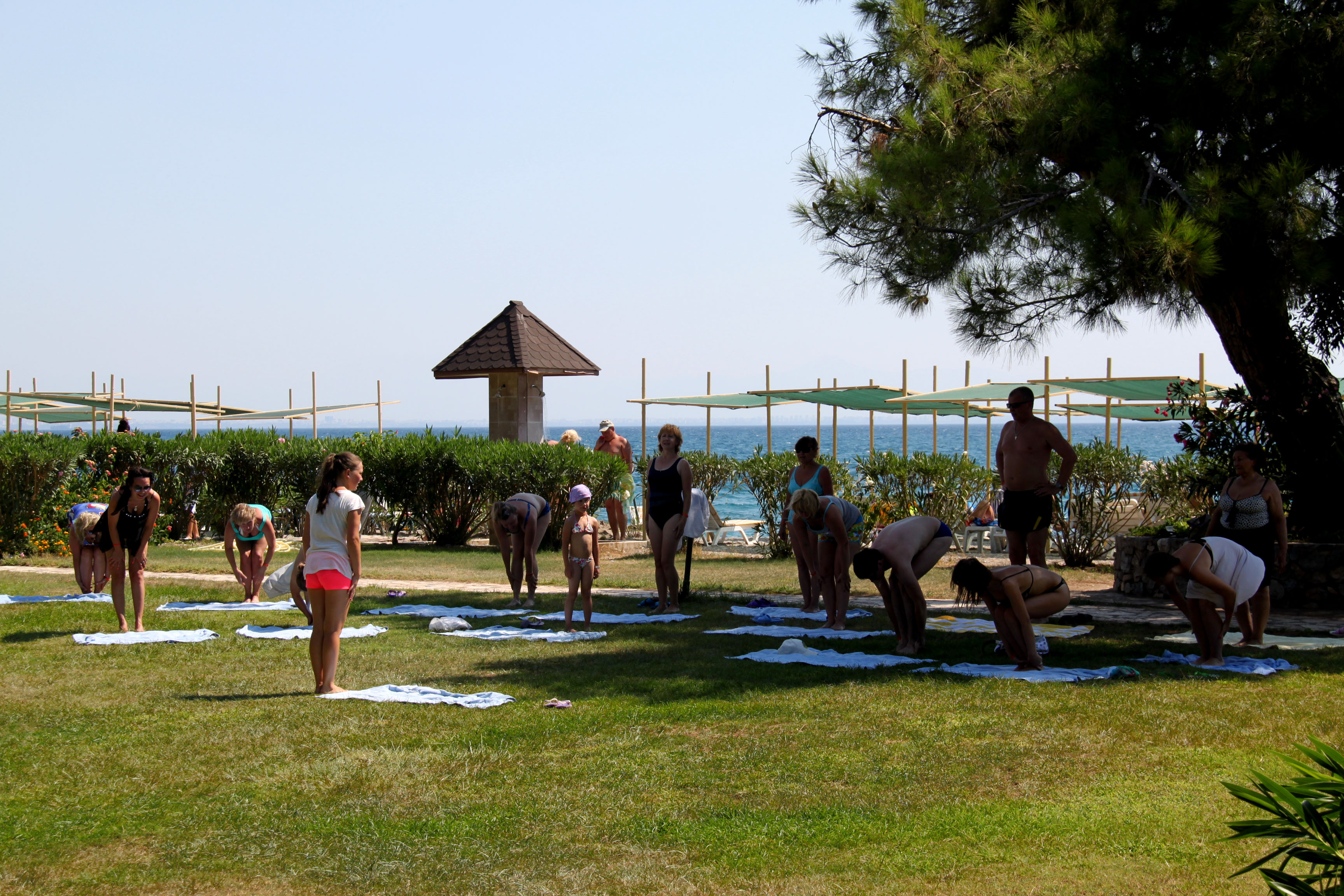 Утренняя зарядка в одном из отелей Бельбиди (Турция)